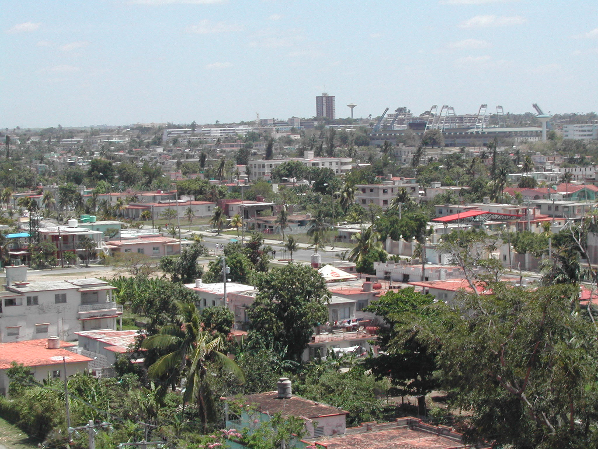 D'Stad Cienfuegos